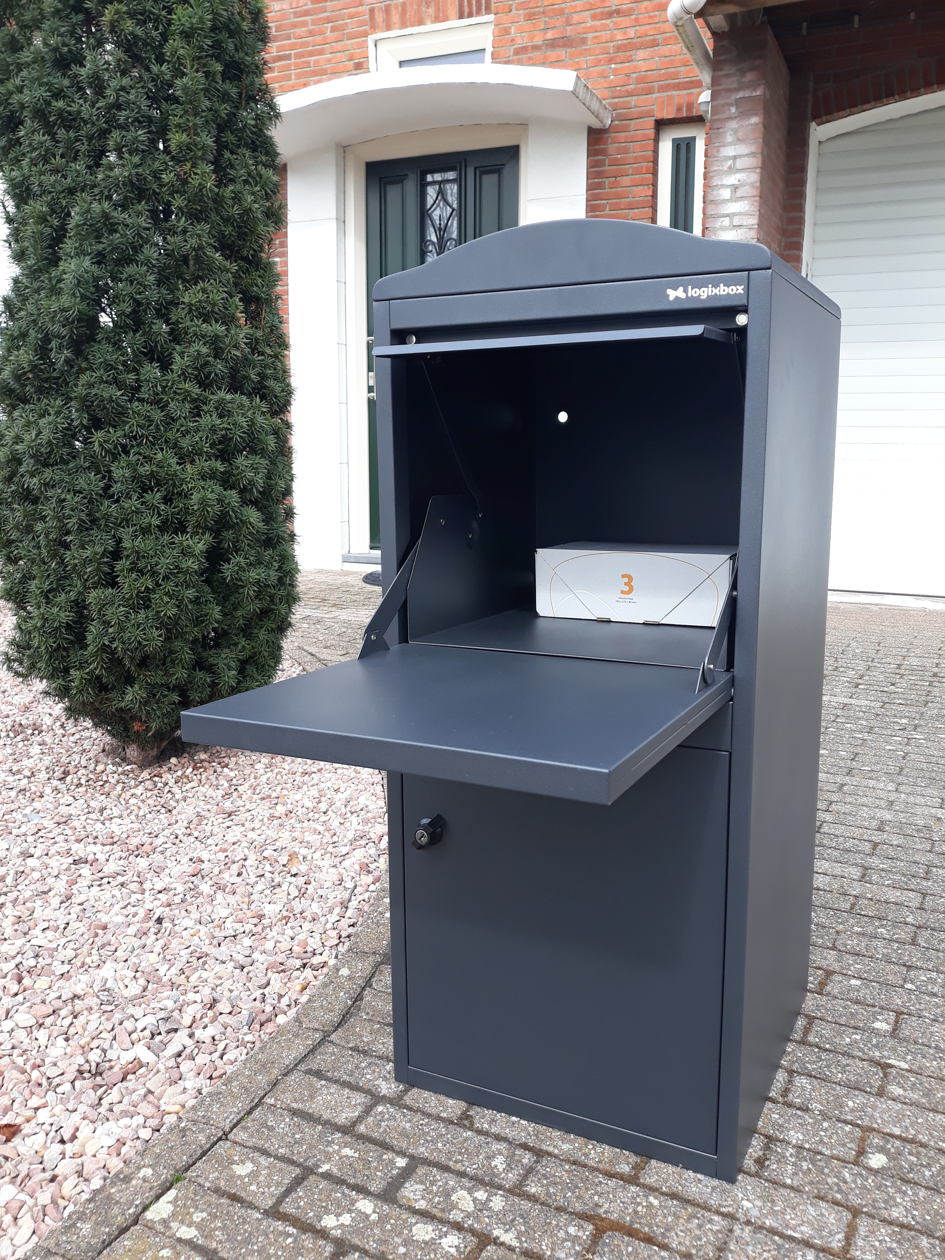 pakketbrievenbus voor het ontvangen van post en pakketten als je niet thuis bent